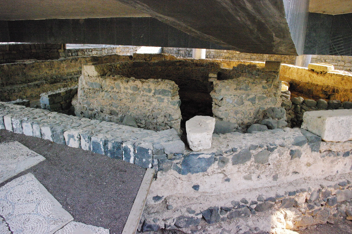 Reste Haus des Petrus